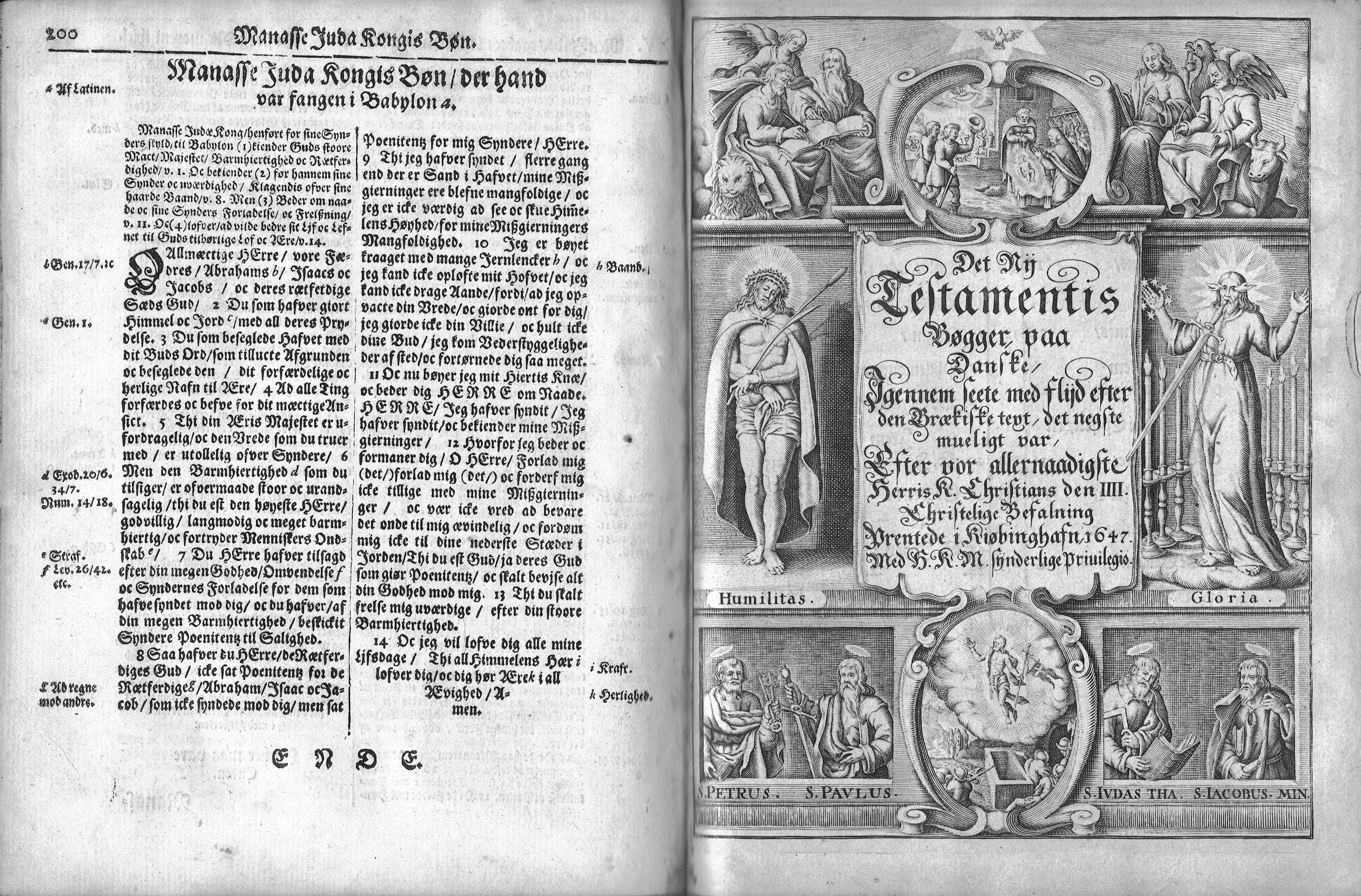 Tittelside for Det nye testamente, gjengitt fra den resen-svaningske bibel, som ble utgitt i 1647. Til venstre gjengis Manasses bønn.